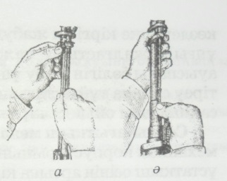 Handhabung des SWD-Scharfschützengewehres.